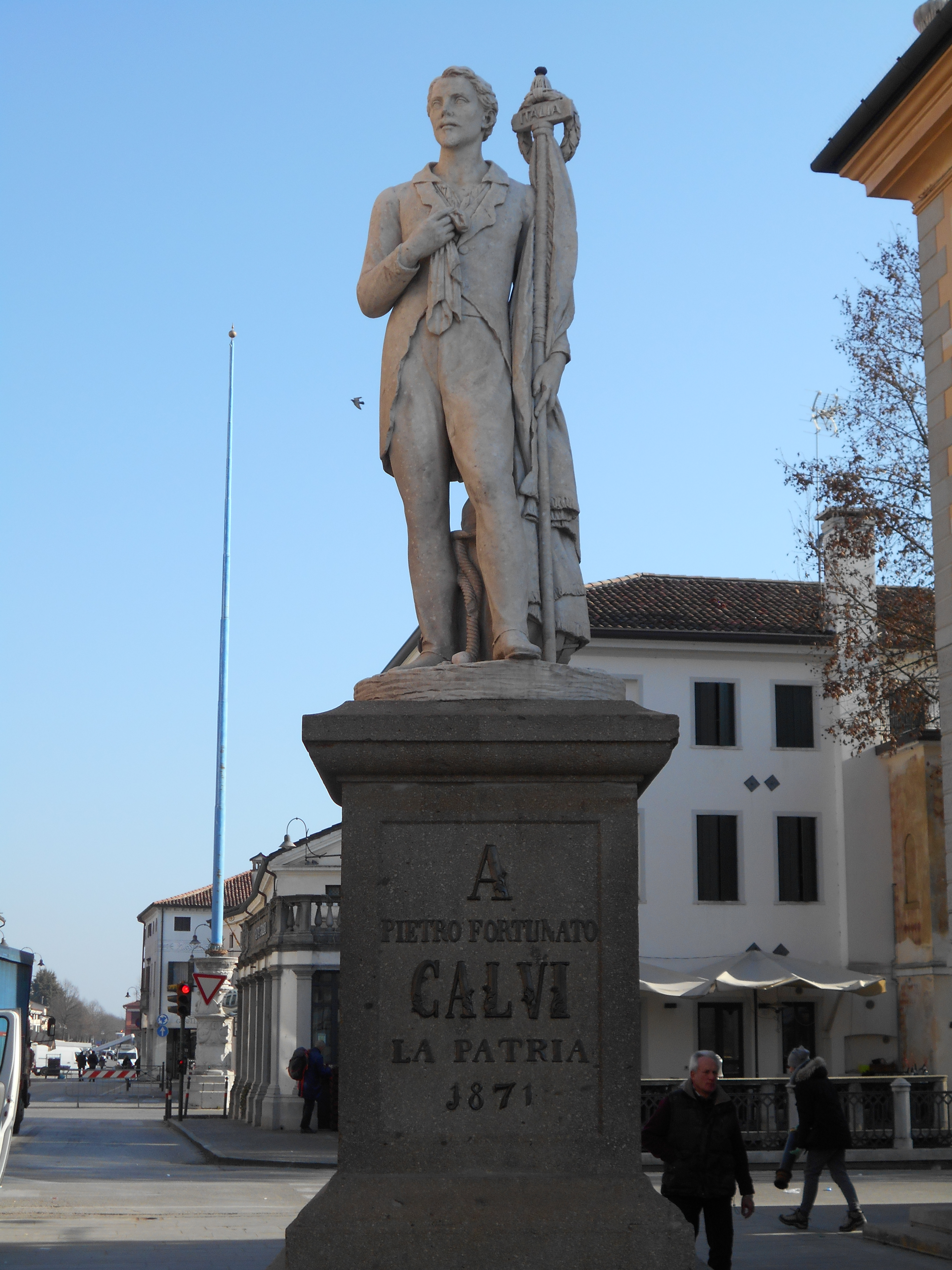 Monumento, Pietro Fortunato Calvi, Noale